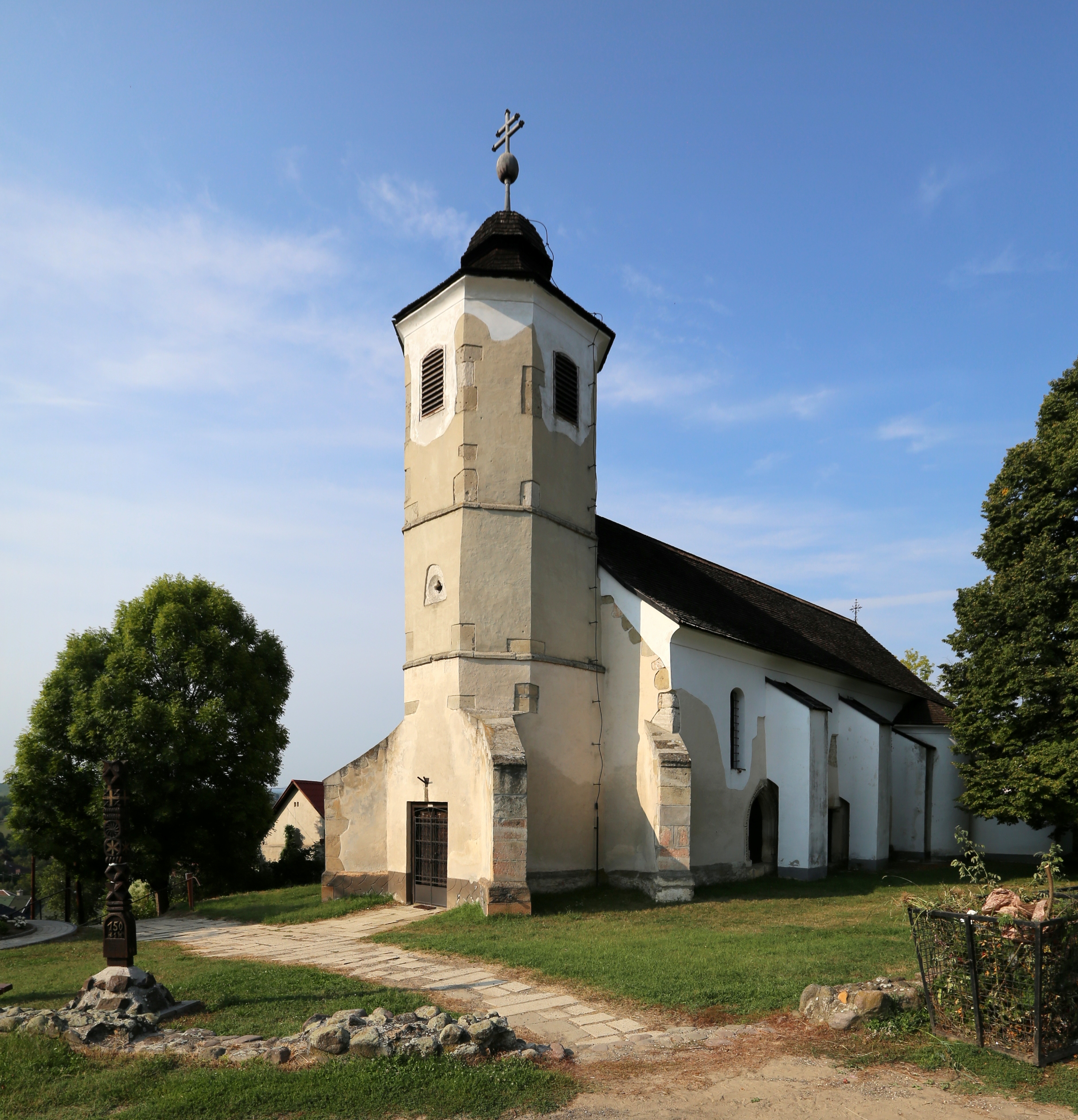 Isaszeg, "Öregtemplom"